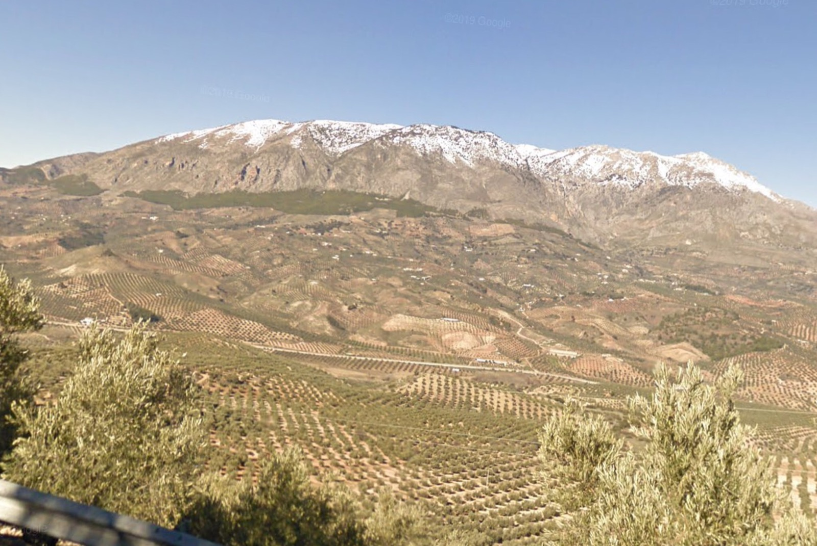 Vista de los cortijos de la pedanía de cabrita (Huelma) en Jaén, en Andalucía, en España. En último término la Sierra de Cabrita que pertenece a Sierra Mágina, nevada.